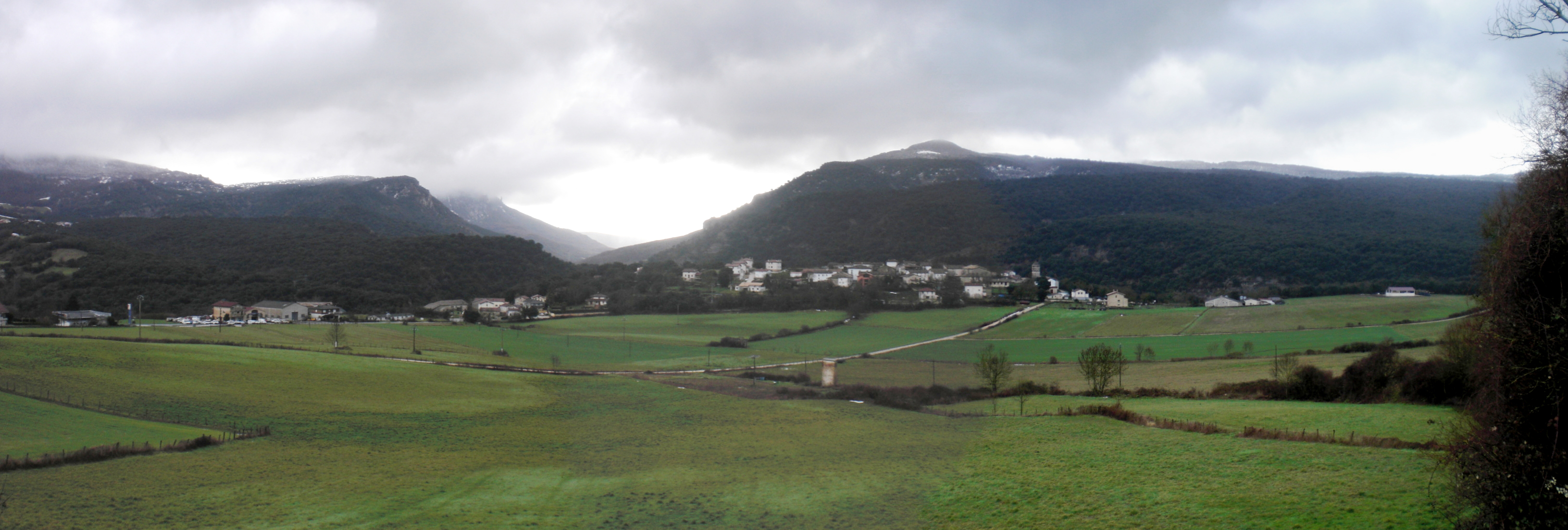 Barindanoren ikuspegia Zudairetik.